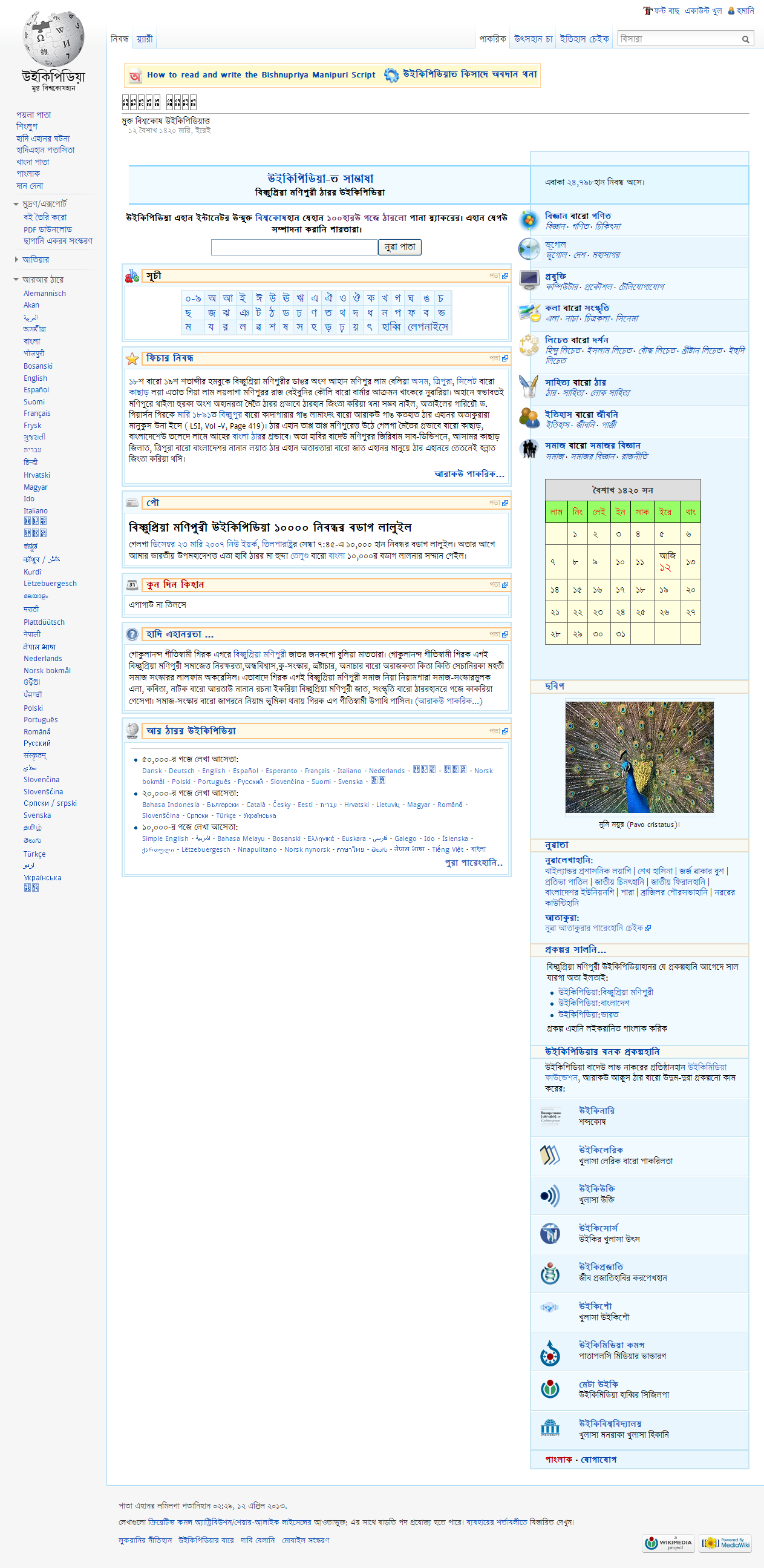 Screenshot - Hlavní strana Bišnuprijskomanipurské Wikipedie ze dne 26. dubna 2013